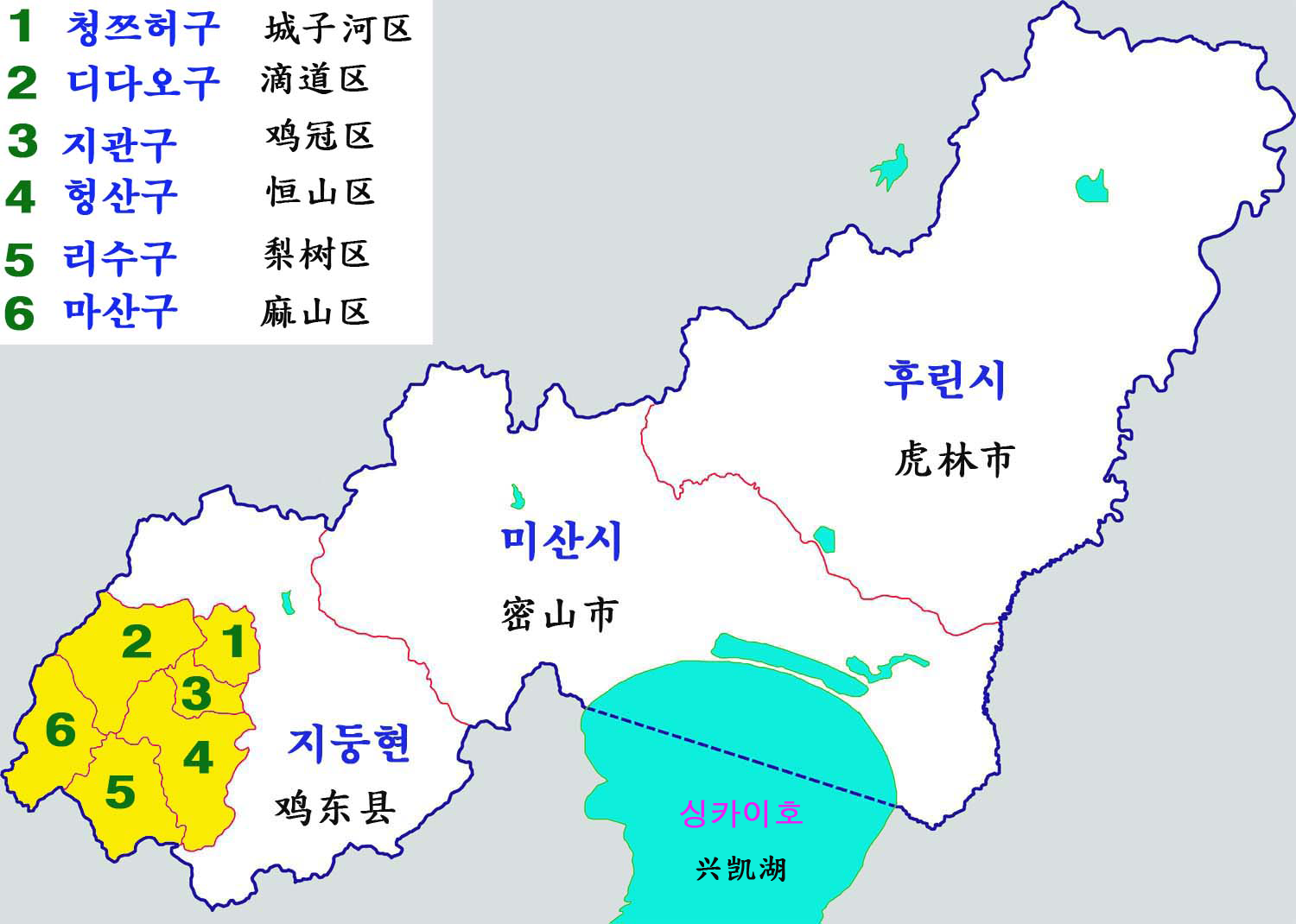 지시시 현급구역